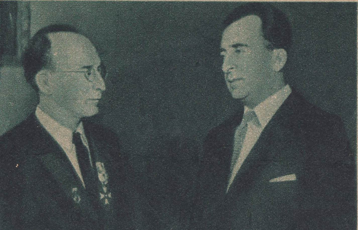 Ambasador Marian Naszkowski wręcza Borysowi Monastyrskiemu (po lewej) order "Polonia restituta" za prace w filmie "Ostatni etap"